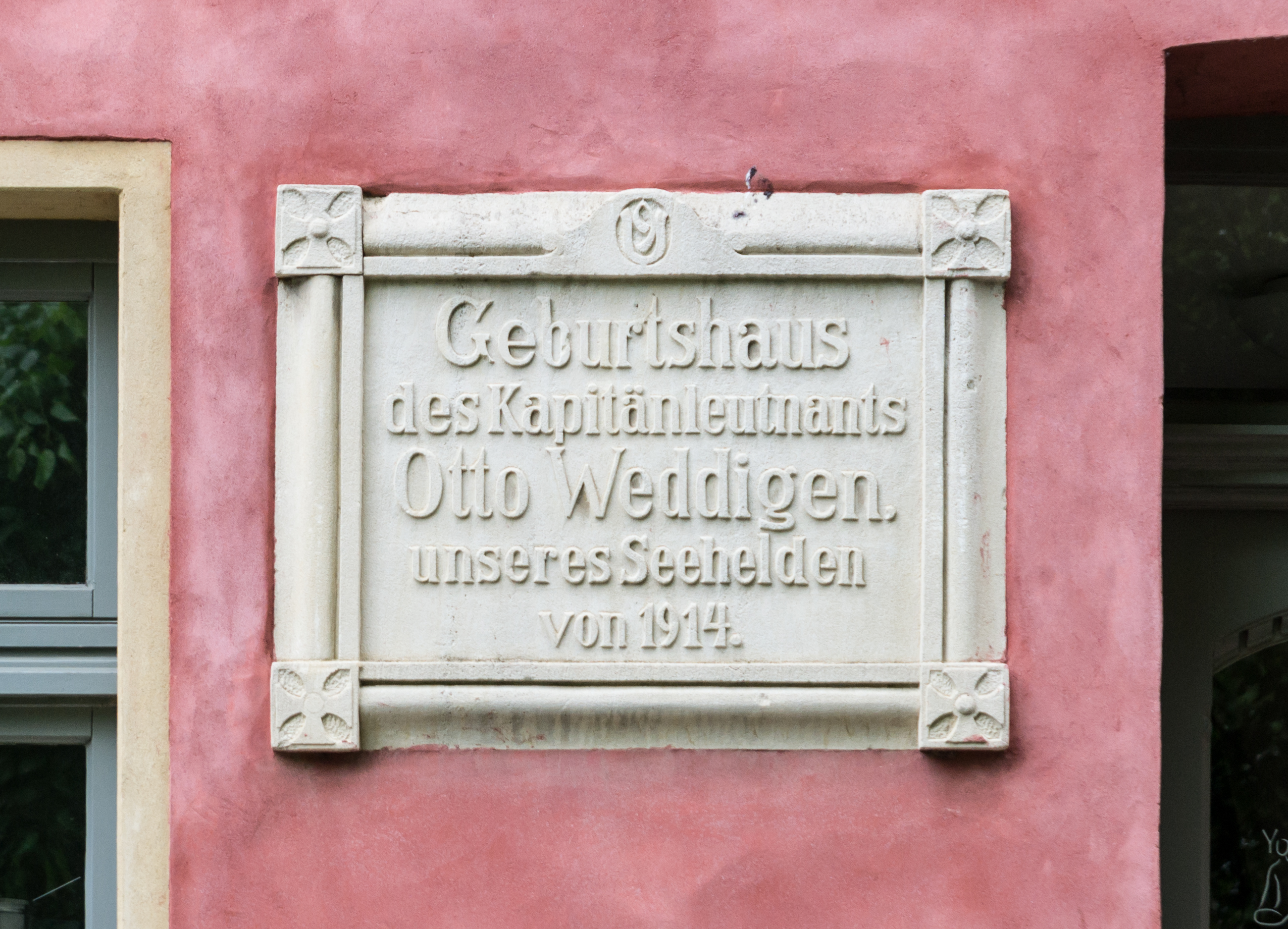 This image shows a heritage building in Germany, located in the North Rhine-Westphalian city Herford (no. 21). Frühherren- bzw. Weddigenhaus in Herford